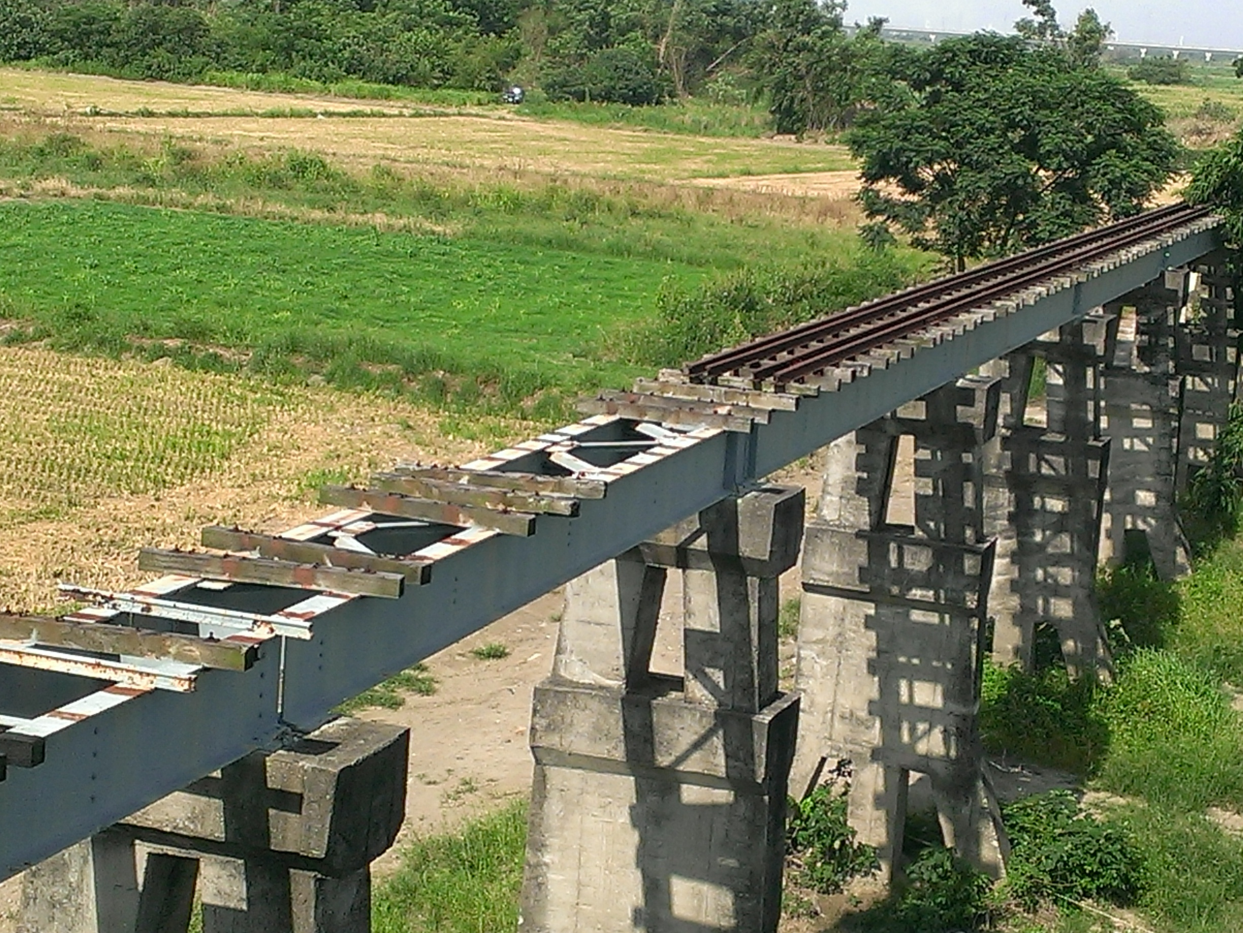 北港復興鐵橋南段